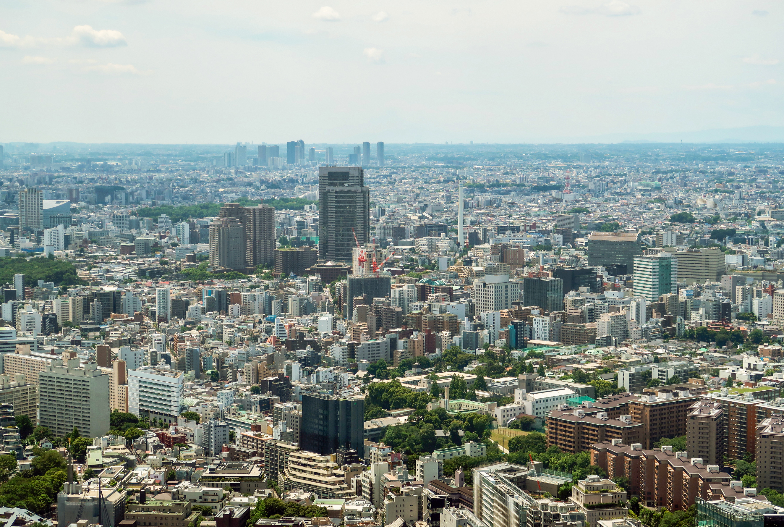 Shibuya-ku Ebisu